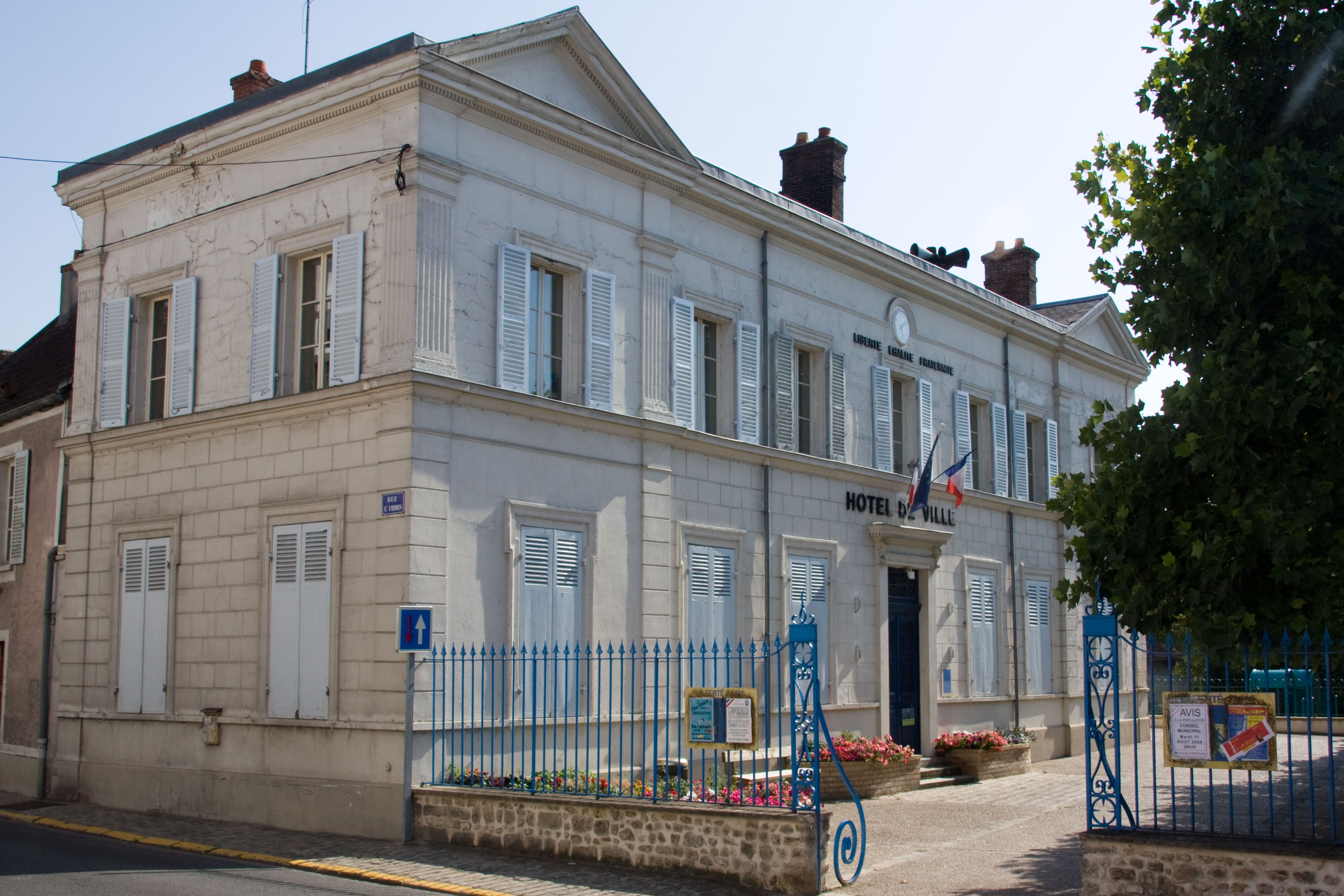 La mairie de La Ferté-Alais, La Ferté-Alais, Essonne, France